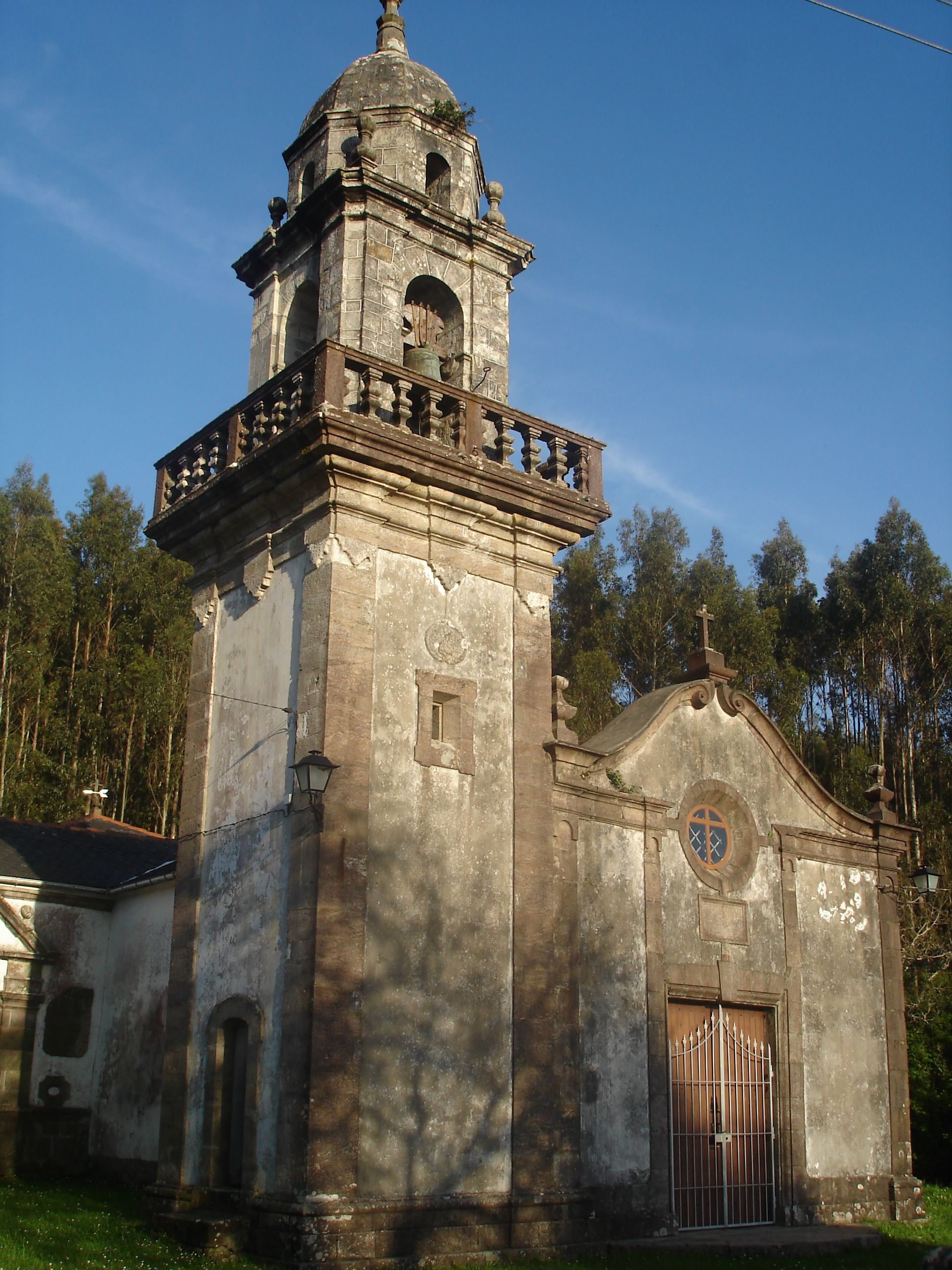 Igrexa de San Xurxo de Moeche